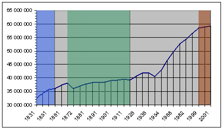 Description de l'image : population francaise depuis 1831